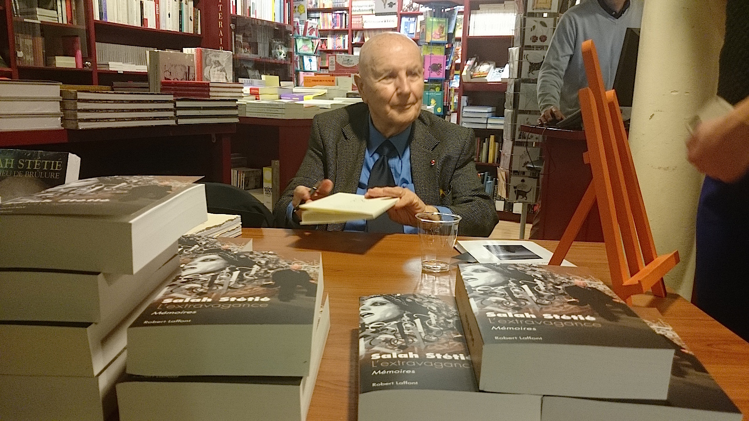 Poète, essayiste et diplomate, Salah Stétié est une des figures les plus importantes de la littérature francophone contemporaine et jouit d'une renommée internationale. L'essentiel de son œuvre poétique a été publié en 2009 dans la collection « Bouquins » sous le titre En un lieu de brulûre.